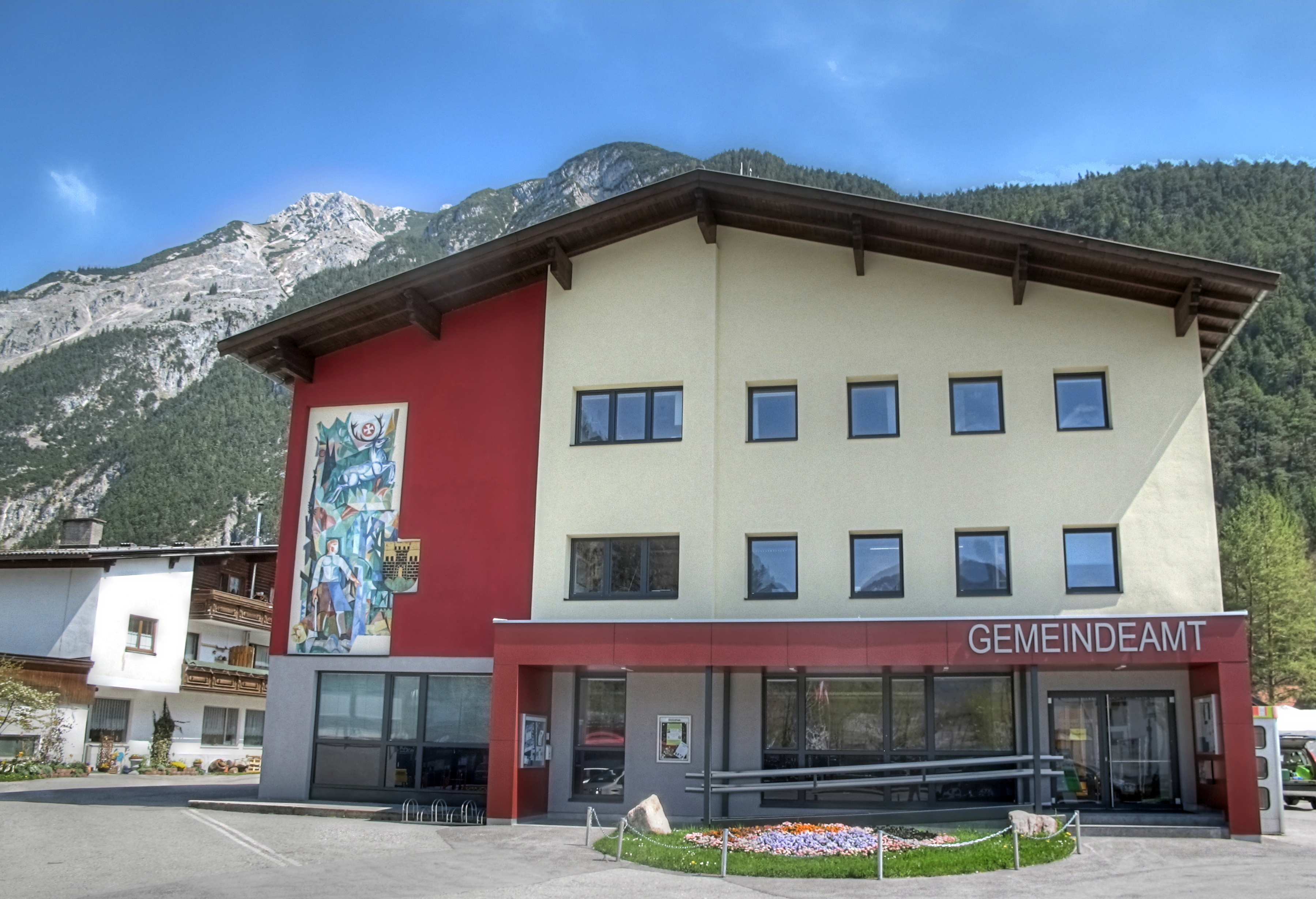 Österreich, Tirol, Scharnitz, Gemeindamt This media shows the remarkable cultural object in the Austrian state of Tyrol listed by the Tyrolean Art Cadastre with the ID 37507.